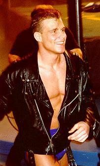 Alex Wright, ex-luchador de la WCW